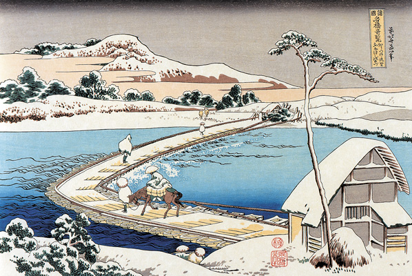 かうつけ佐野ふなはしの古づ(こうつけさのふなはしのこず)